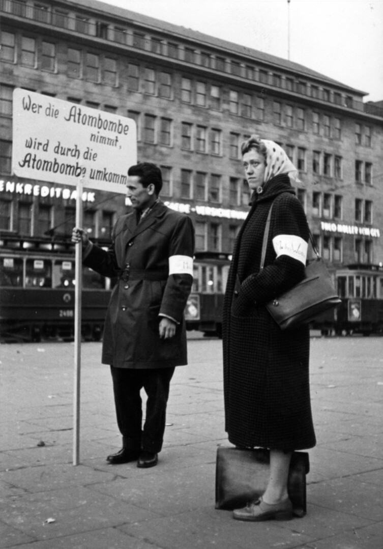 Mahnwache 1958, Rathausplatz Hamburg (Walter Thomsen, Helga Tempel)